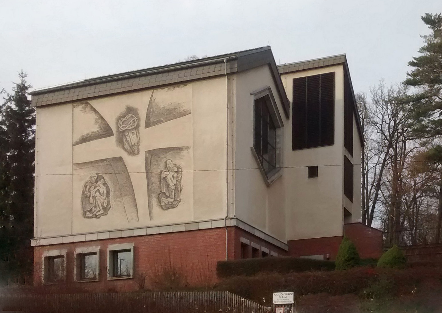 Kathlische Kirche in Netzschkau, 1991 geweiht